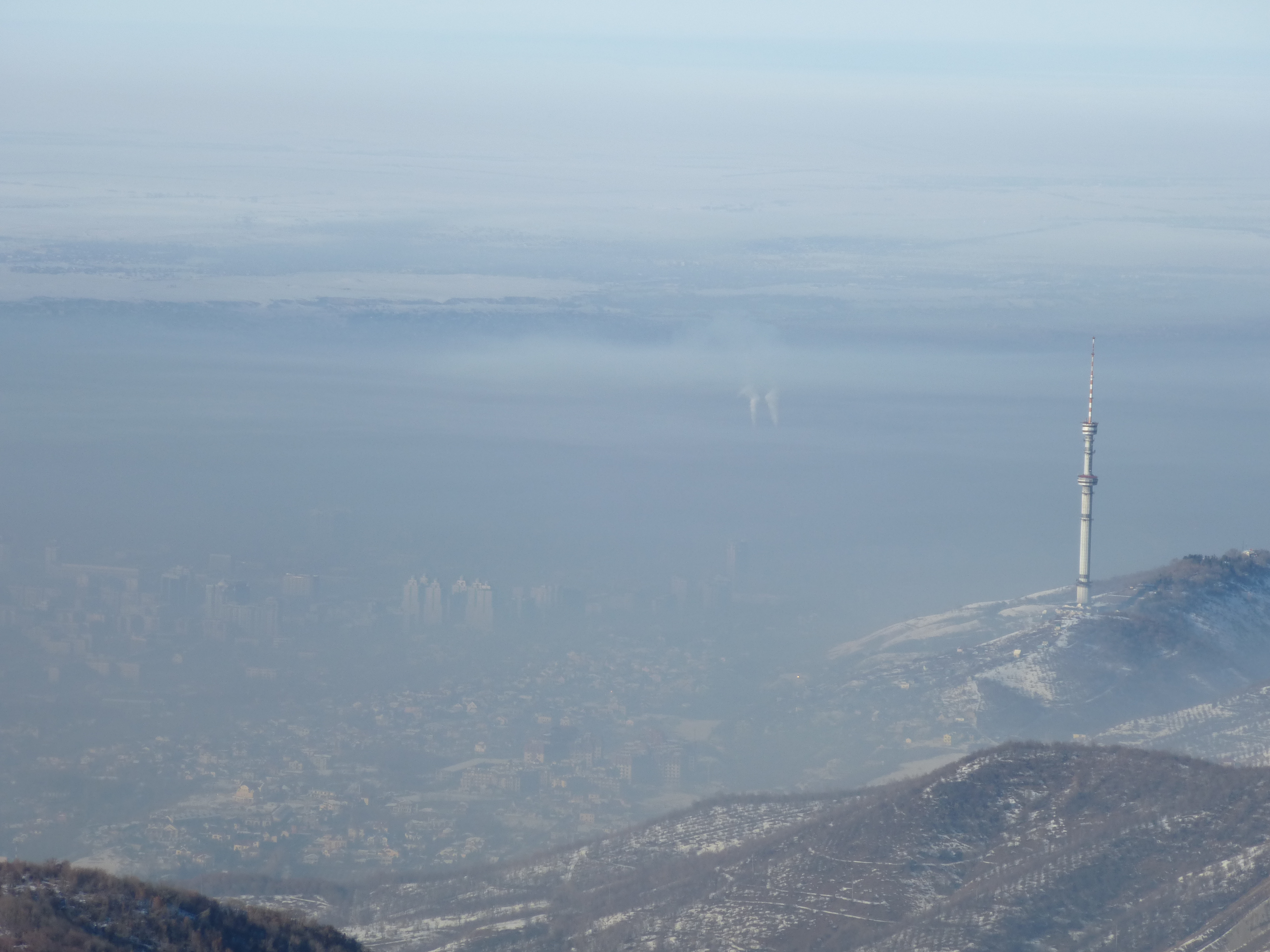 Смог над Алма-Атой. Вид на город с гор. Точка съёмки - Кок-Жайляу (верхняя часть ущелья Казачки). На правой части снимка проглядывает телебашня на горе Кок-тобе.